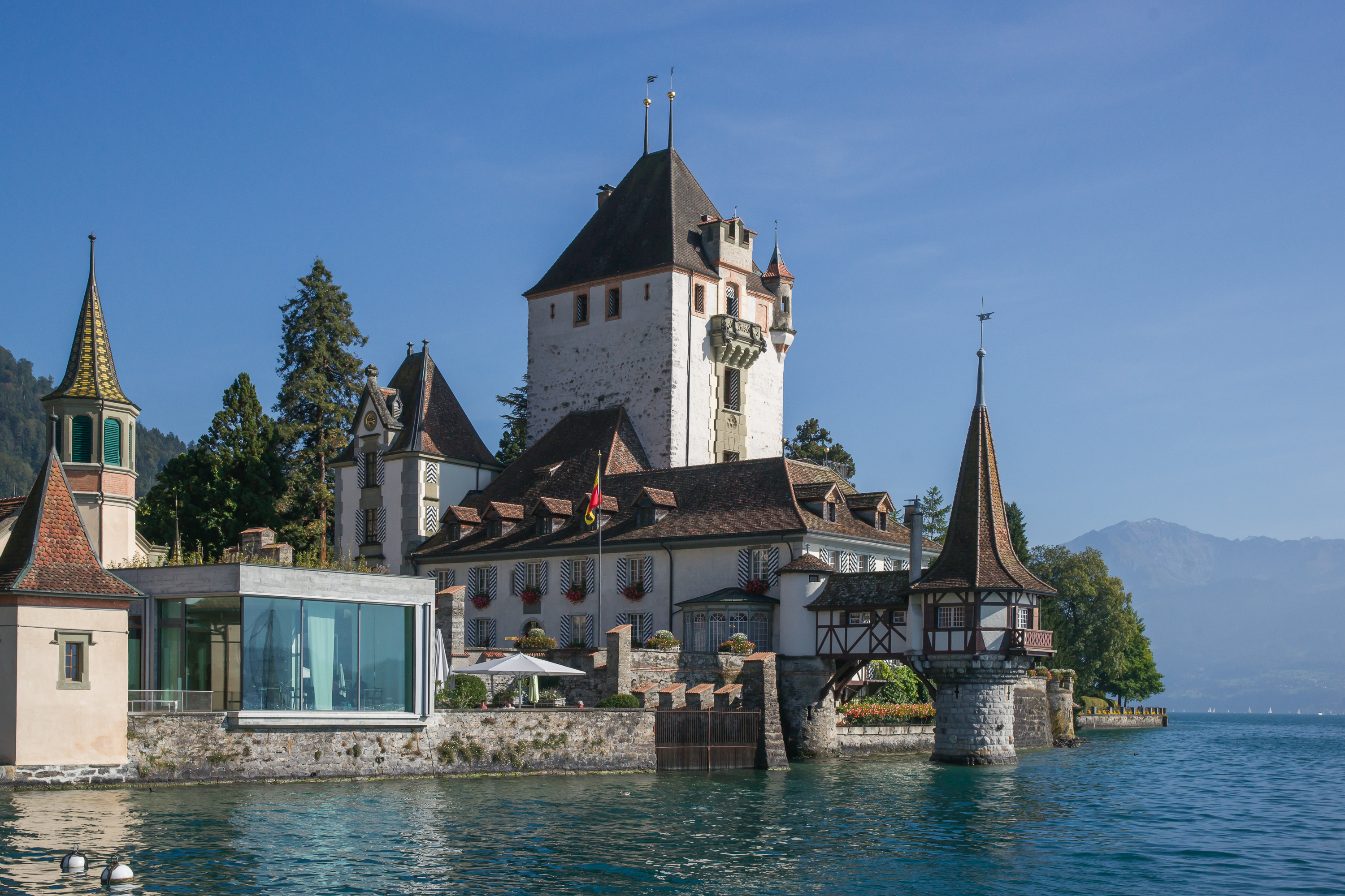 Schloss Oberhofen vom Schiffsteg aus